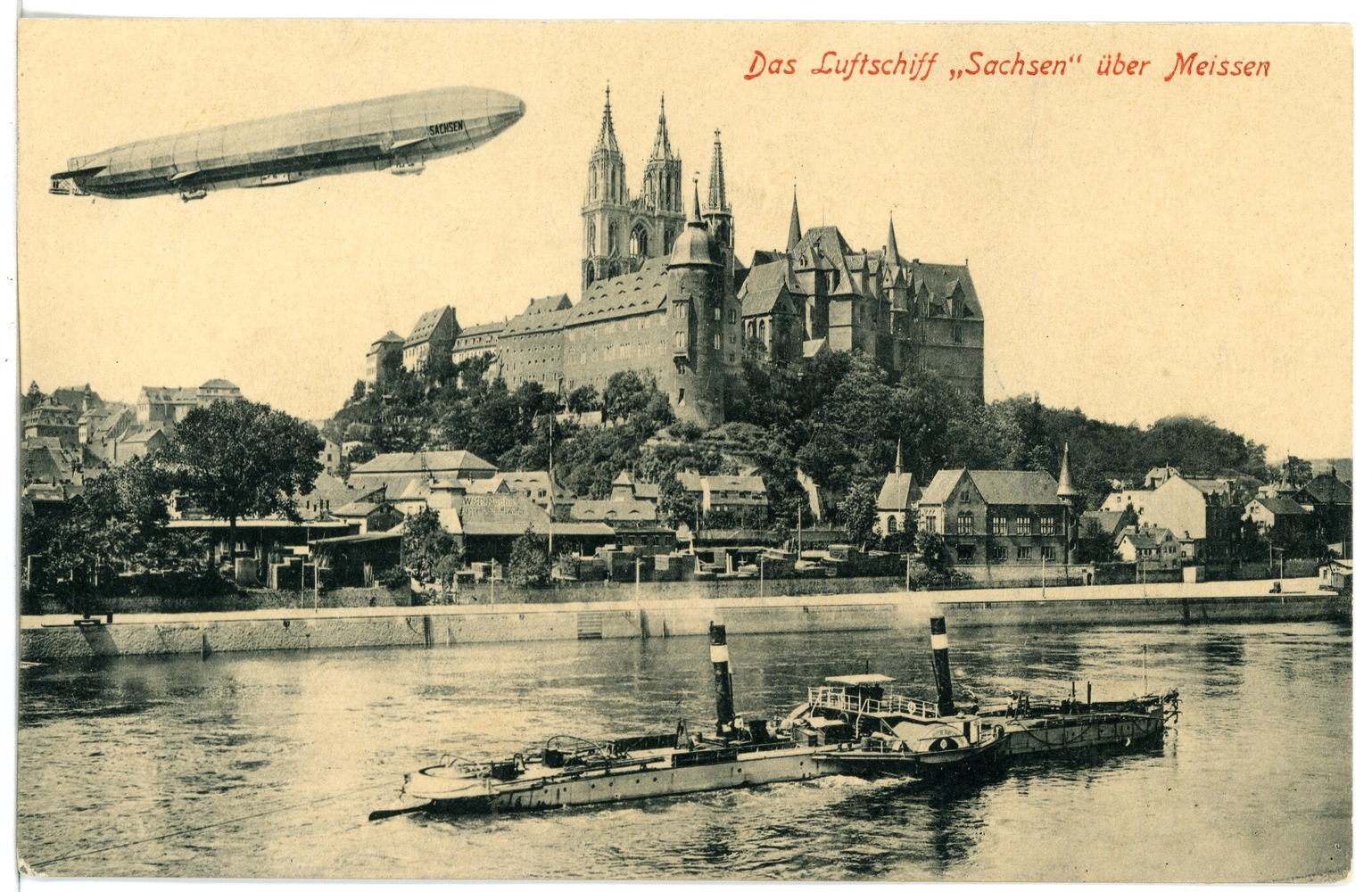 Meißen; Das Luftschiff "Sachsen" über Meißen This postcard is from publisher Brück & Sohn in Meißen ( postcard has a unique number 16708 and is available in a higher resolution at the publisher. This images was uploaded in a cooperation project between Wikipedians and the publisher.